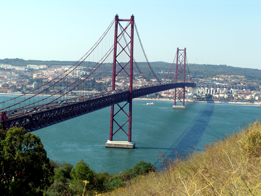 Ponte 25 de Abril vista de Almada.